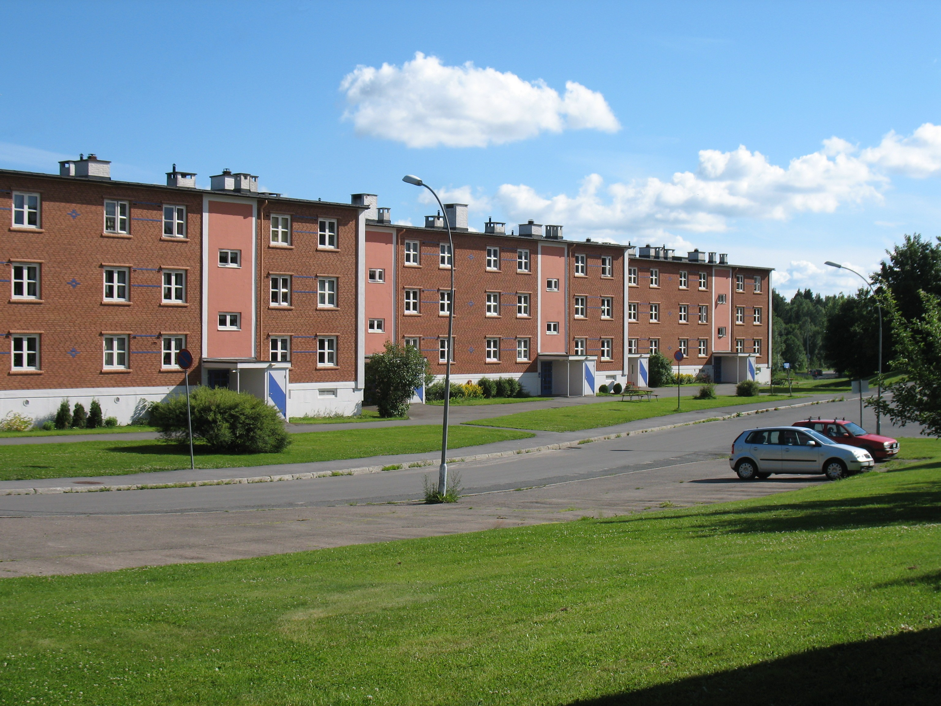 Gaten Rustadsaga på Bogerud i Oslo